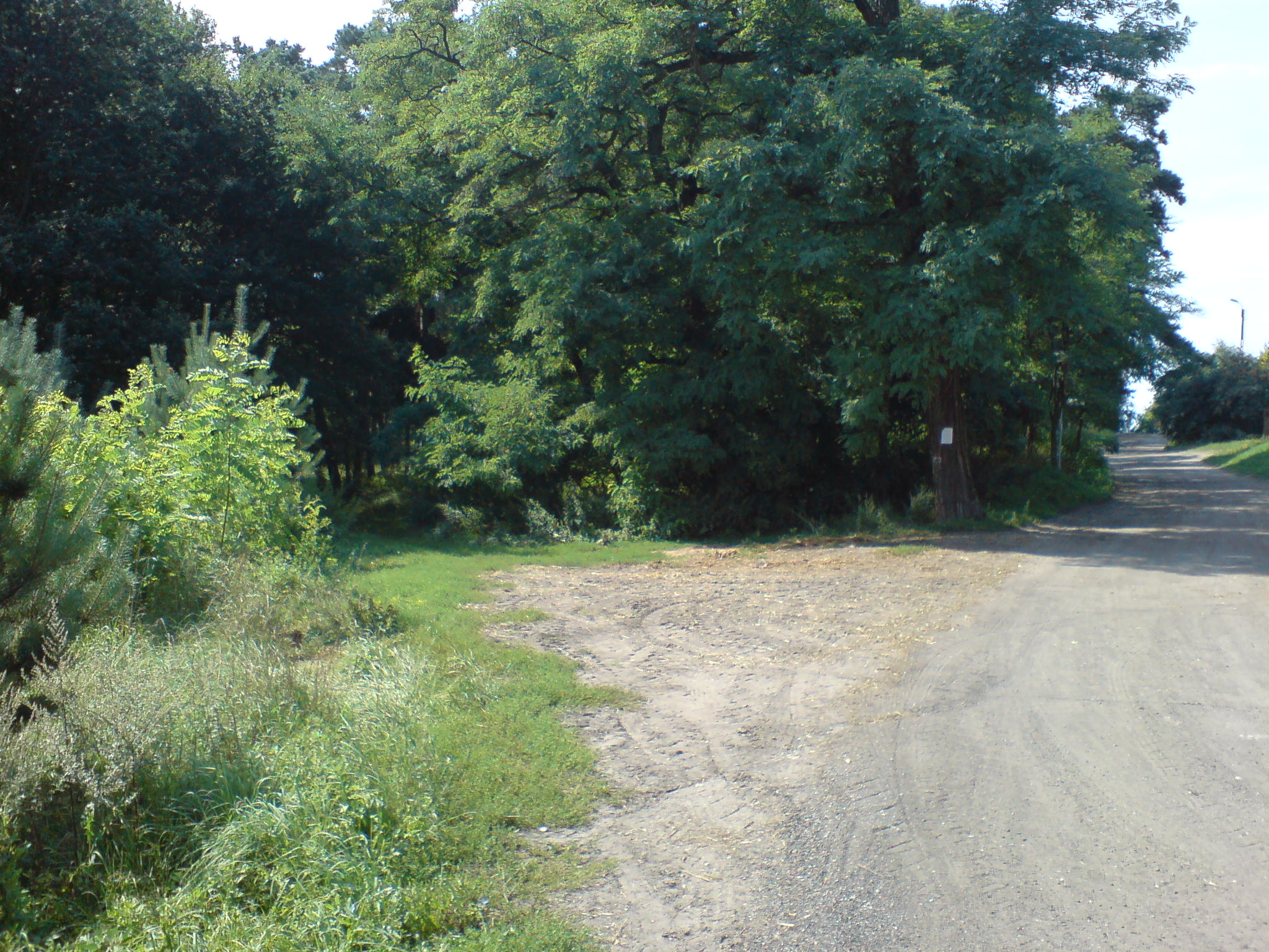 wjazd do lasu za Trzebawem